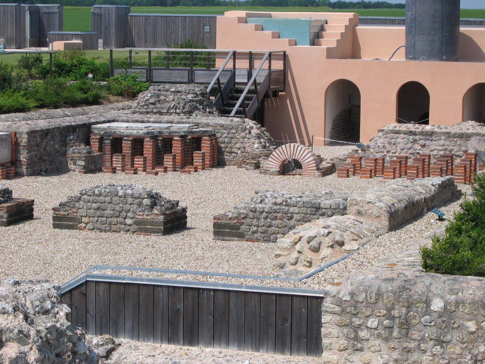 Thermes de Gisacum, commune du Vieil-Évreux, Eure